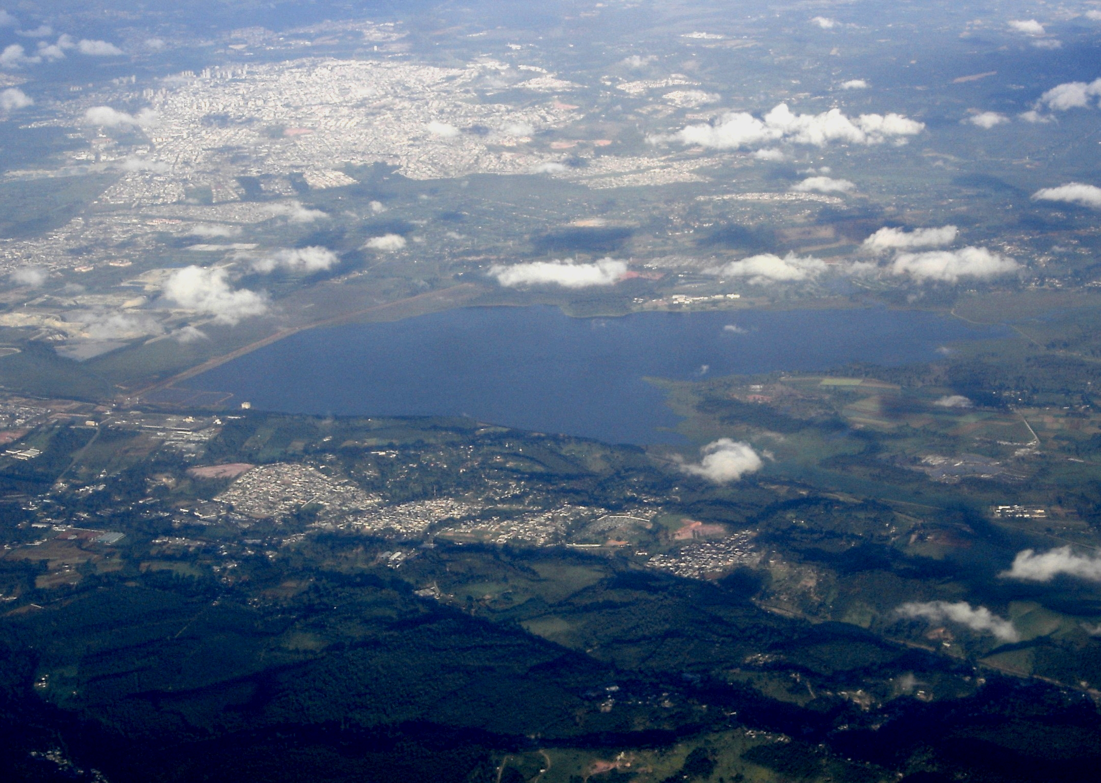 Represa de Taiaçupeba, Mogi das Cruzes - Brasil